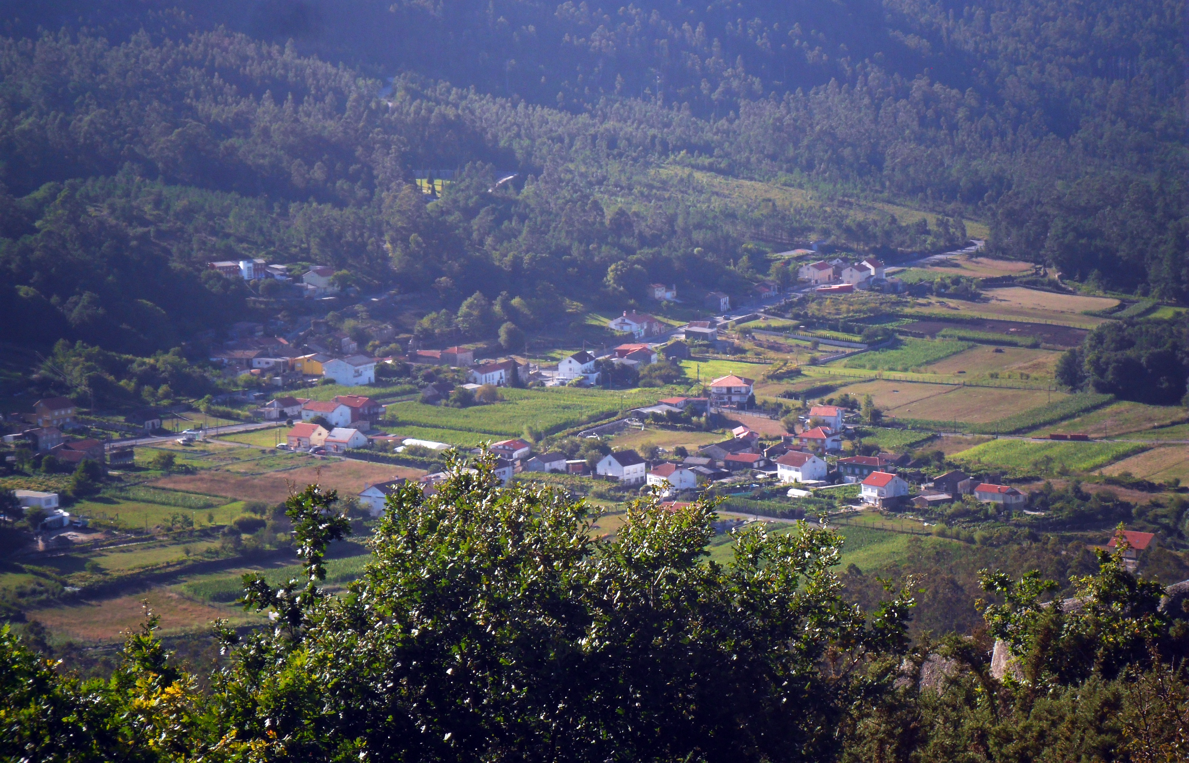 Aldea del municipio de Lousame.